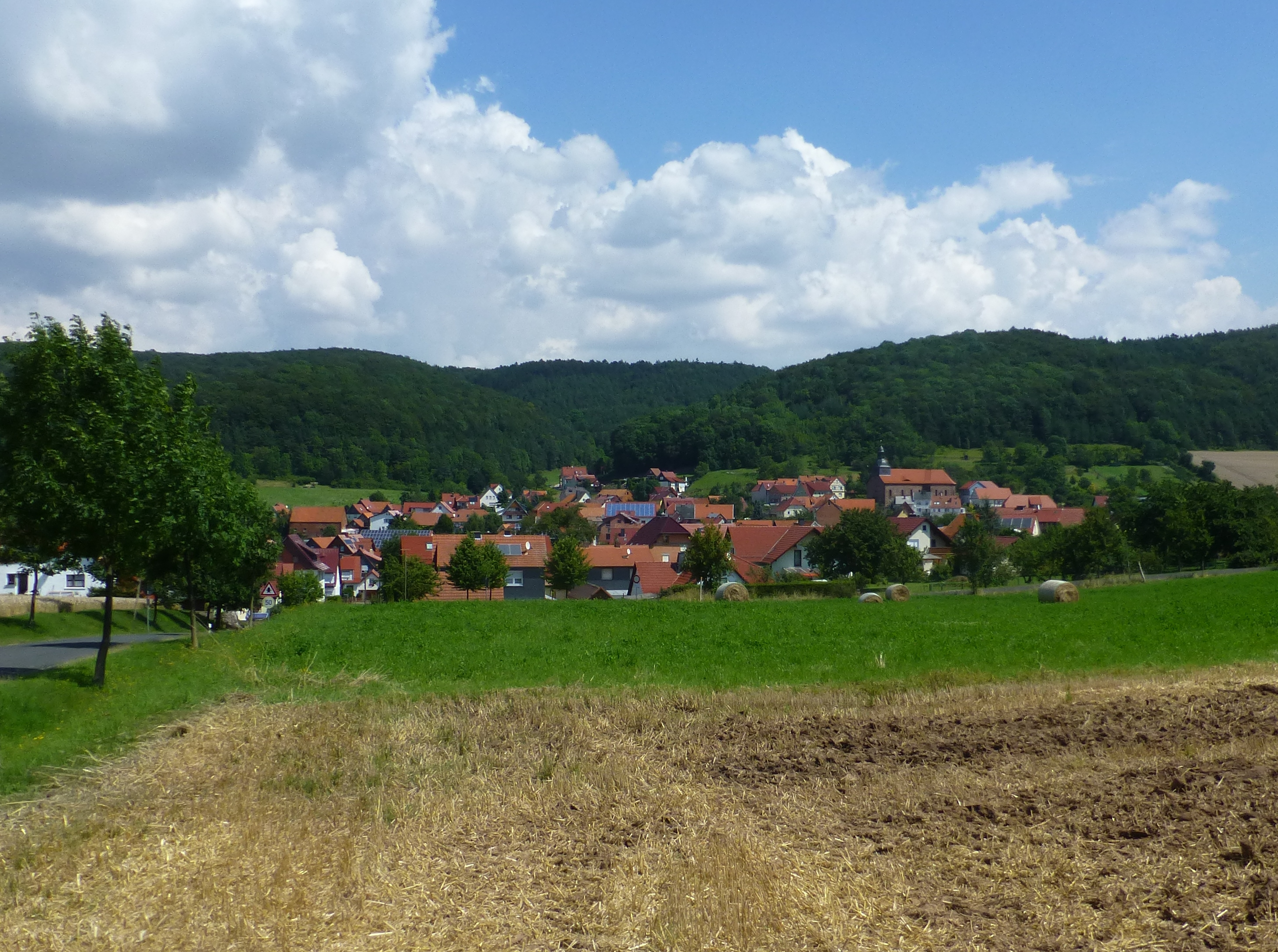 Blick auf Gerbershausen (dahinter links der Sattel und rechts der Hamelsberg)